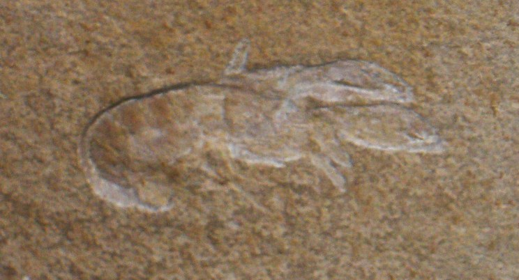 Fossil of Magila, an extinct arthropod- Took the photo at Fossil Show, Munchen 2011